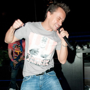 Алексей Серов на презентации клипа «Нано-Техно» в ресторане «Ноа» 20 октября 2011 года